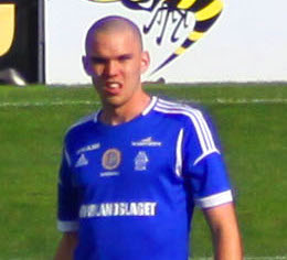 Marcus Danielsson